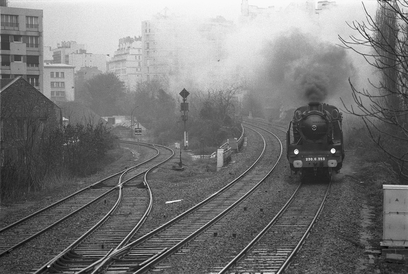 La 230 G 353 passe au niveau du raccordement de Bel-Air sur la Petite Ceinture, dans le 12e arrondissement de Paris au mois de novembre 1985.